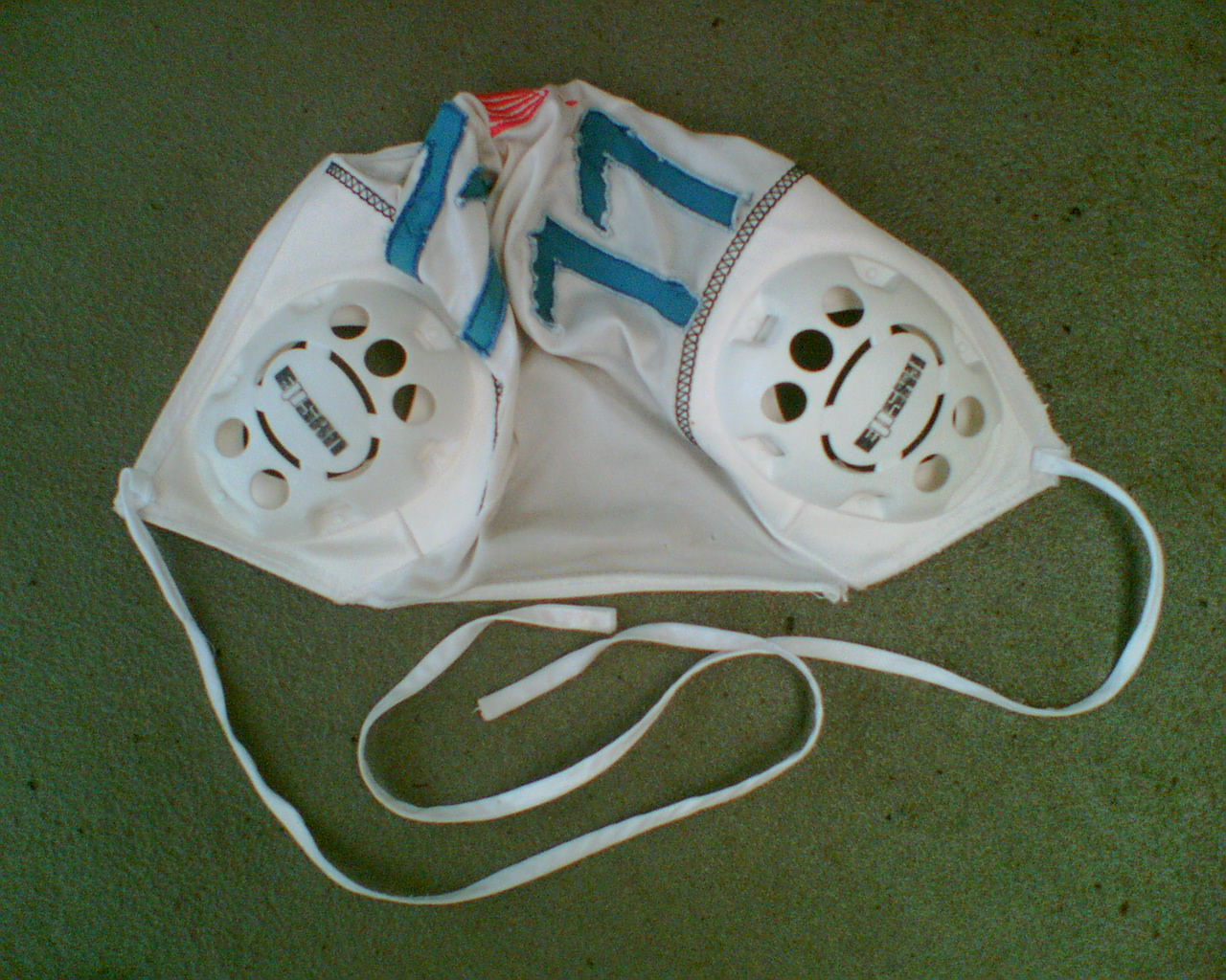 Selbst geknippst. GNU FDL. 1280 x 1024. 443 KB.